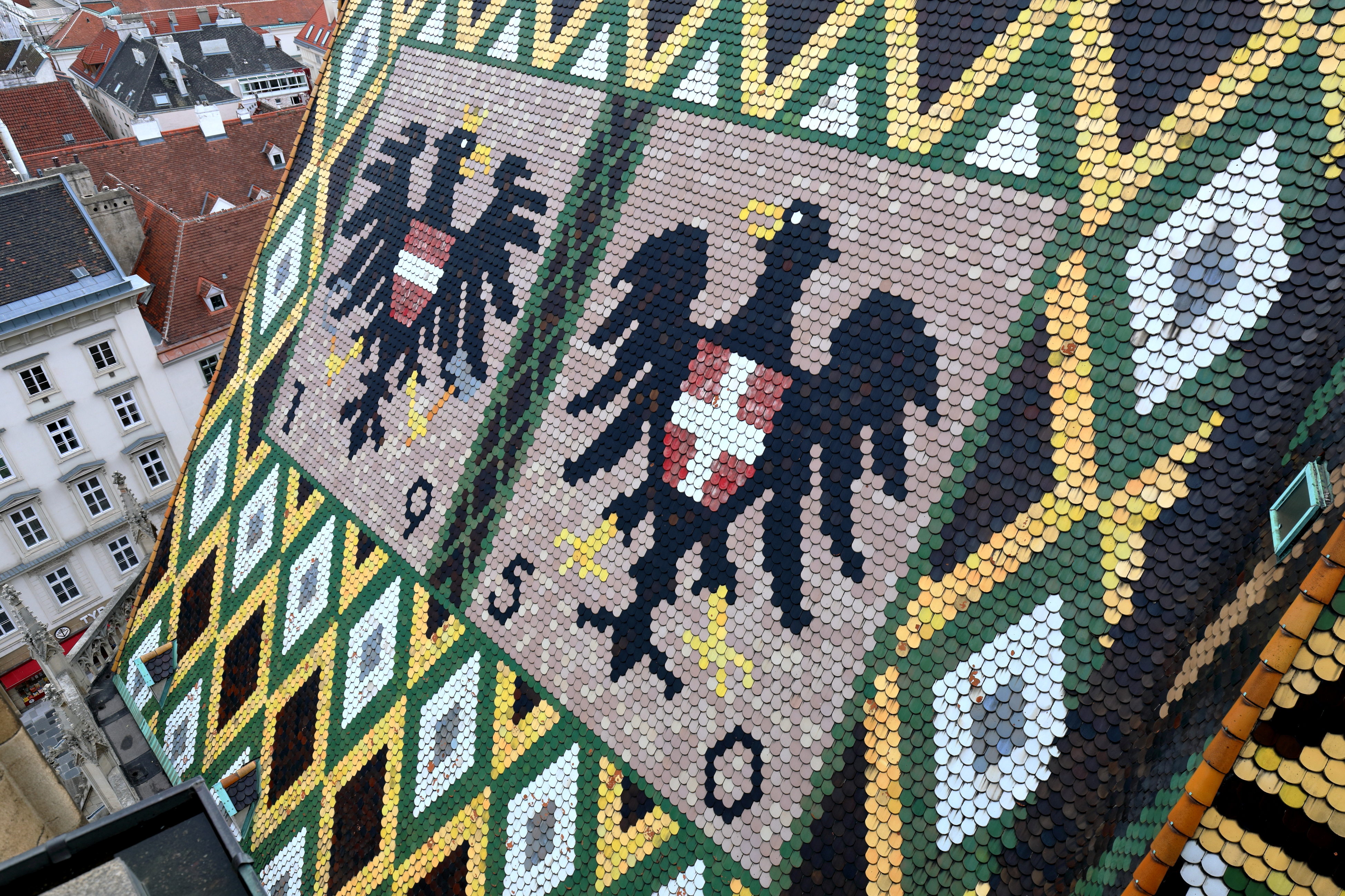 Die nordseitigen Wappen am Albertinischen Chordach des Stephansdoms in der österreichischen Bundeshauptstadt Wien.Dargestellt sind die Wappen der Republik Österreich (bei dem allerdings der Adler in die falsche Richtung blickt) und der Stadt Wien, die durch die Zahl 1950 (Abschluss der Dachdeckung nach Zerstörung im II. WK) verbunden sind. Insgesamt sind am Dom rund 230.000 bunt glasierte Dachziegel verbaut. Jeder dieser Ziegel wiegt etwa 2,5 Kg, ist mit zwei Kupfernägel an die Dachsparren angenagelt und zusätzlich noch in Mörtel gebettet. Am südseitigen Albertinischen Chordach ist das Wappen des österreichischen Kaisertums mit der Jahreszahl 1831 (Neueindeckung des Daches) sowie dem Monogramm F.I. (Franz I.) dargestellt.